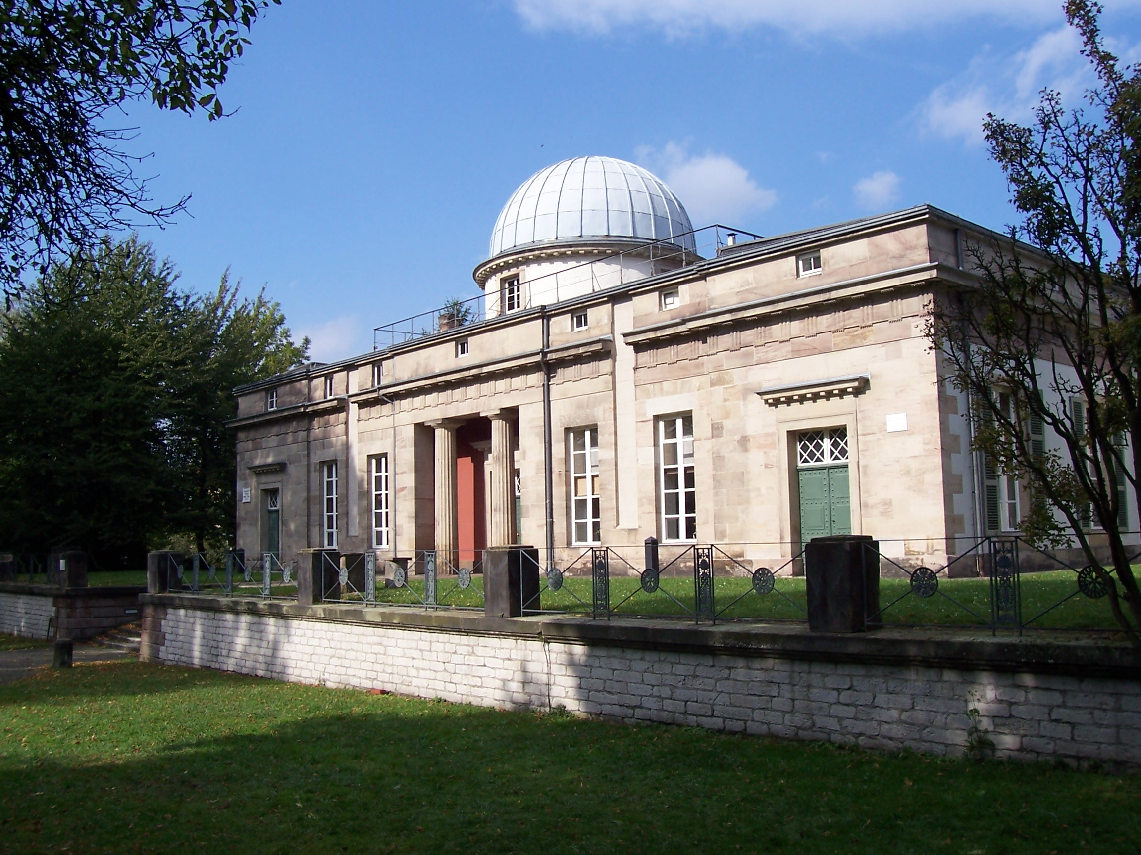 Summary Die Historische Sternwarte Göttingen Quelle: selbst fotografiert Datum: 2004.10.05 Lizenz: GPL +